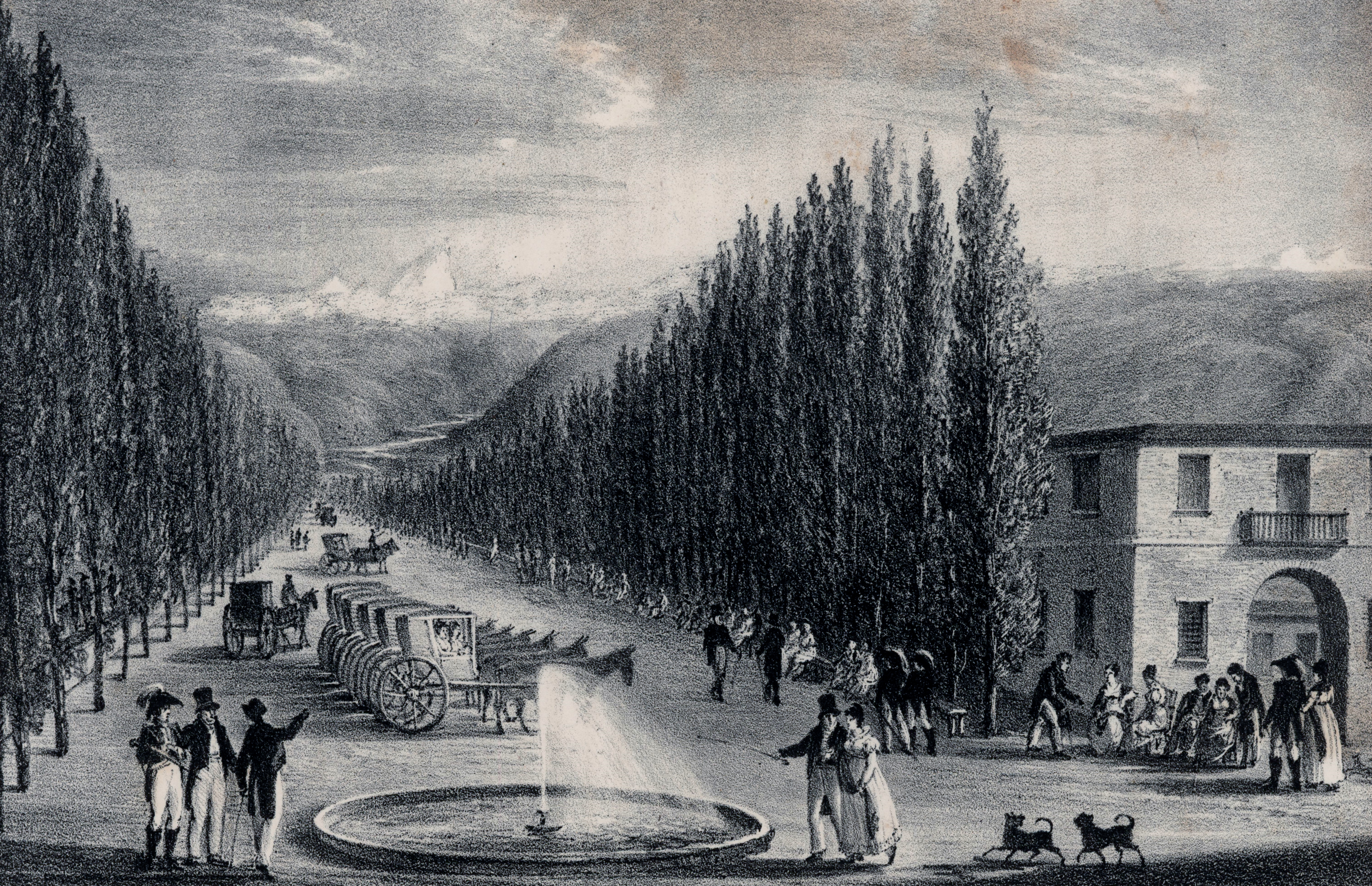 Alameda que corría paralela a los tajamares del Mapocho (a la izquierda detrás de la línea de árboles, pero prácticamente no se ven en el grabado) y que era un paseo público. Dibujo del viajero y filántropo inglés Peter Schmidtmeyer; litografía de Agostino Aglio; impresa por Rowney & Forster y publicada en el de libro de Schmidtmeyer Travels into Chile, over the Andes, in the years 1820 and 1821, London: Longman, Hurst, Rees, Orme, Brown and Green, 1824.